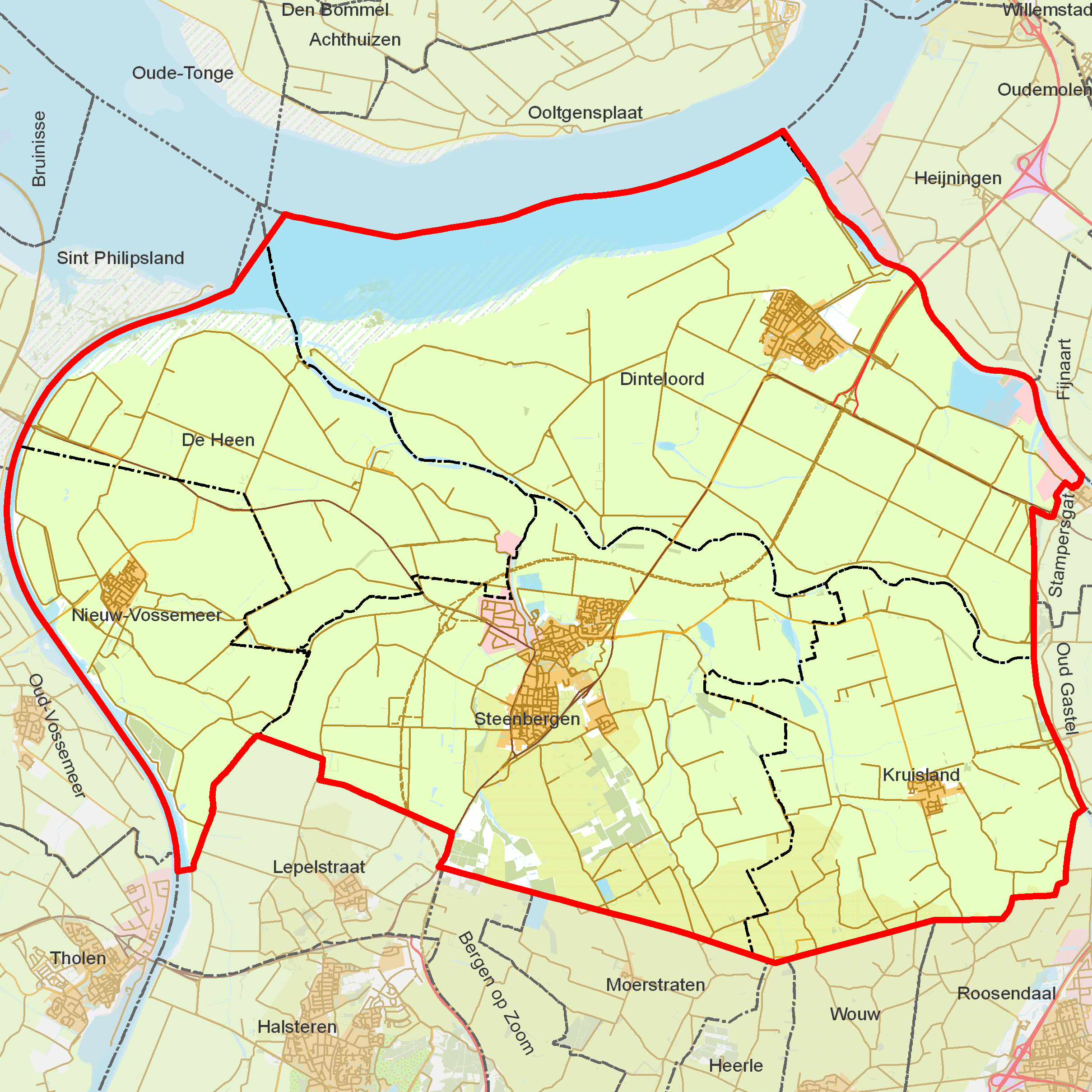 BAG woonplaatsen - Gemeente Steenbergen.png